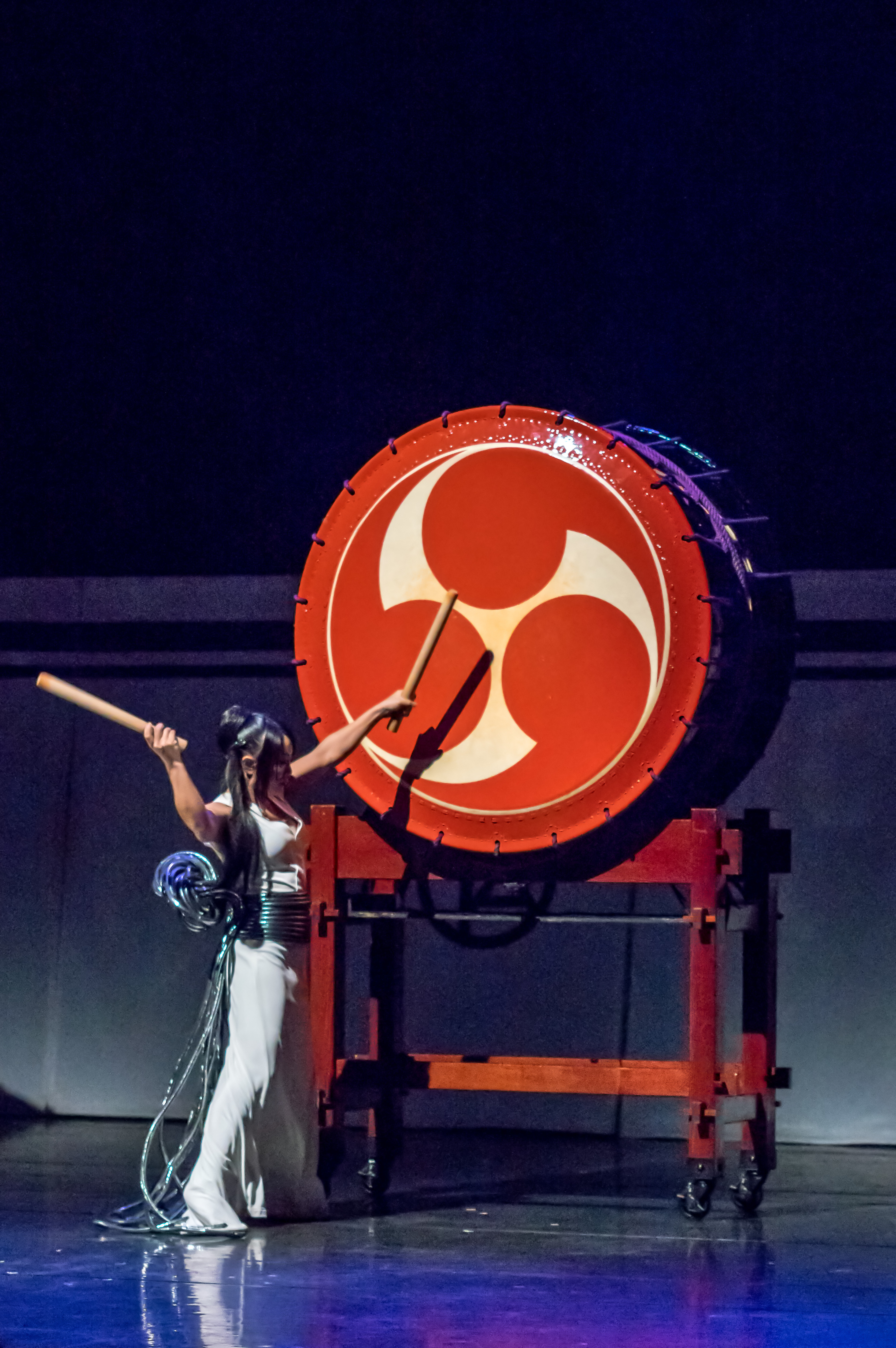 Bilder vom Konzert am 25. Januar 2015 in Freiburg i. Br. TAO - Die Kunst des Trommelns